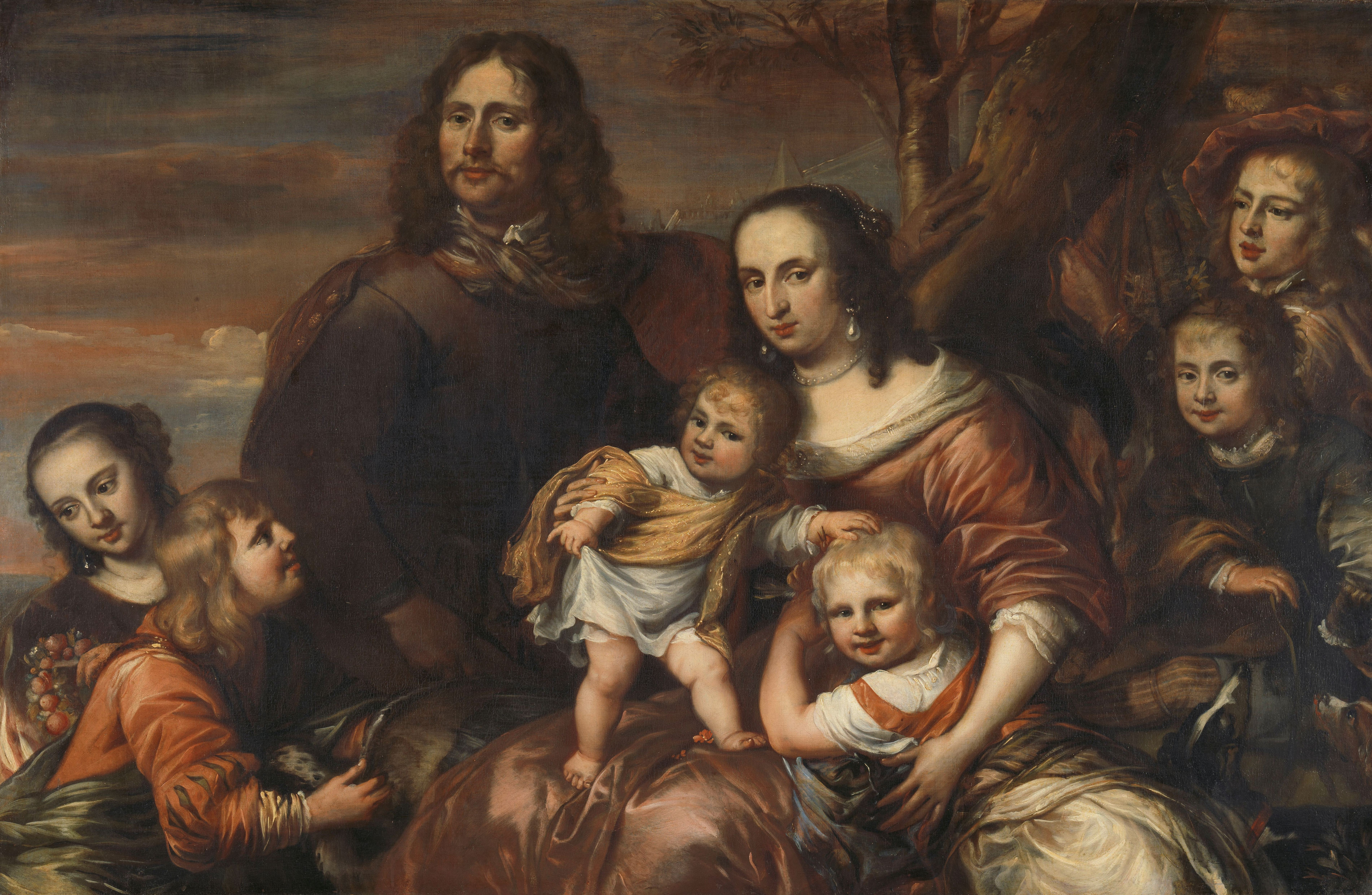 Familieportret van een echtpaar omringd door hun zes kinderen. Geportretteerd buiten onder een boom, rechts twee honden.